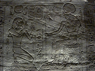 Abou Simbel, le temple de Ramses II,Ramsès II officiant devant un dieu qui semble être Horus